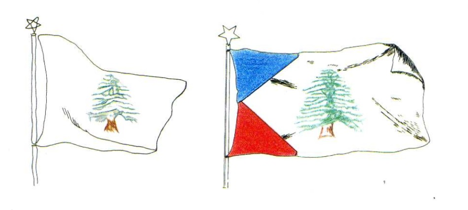 Anciens drapeaux du Liban